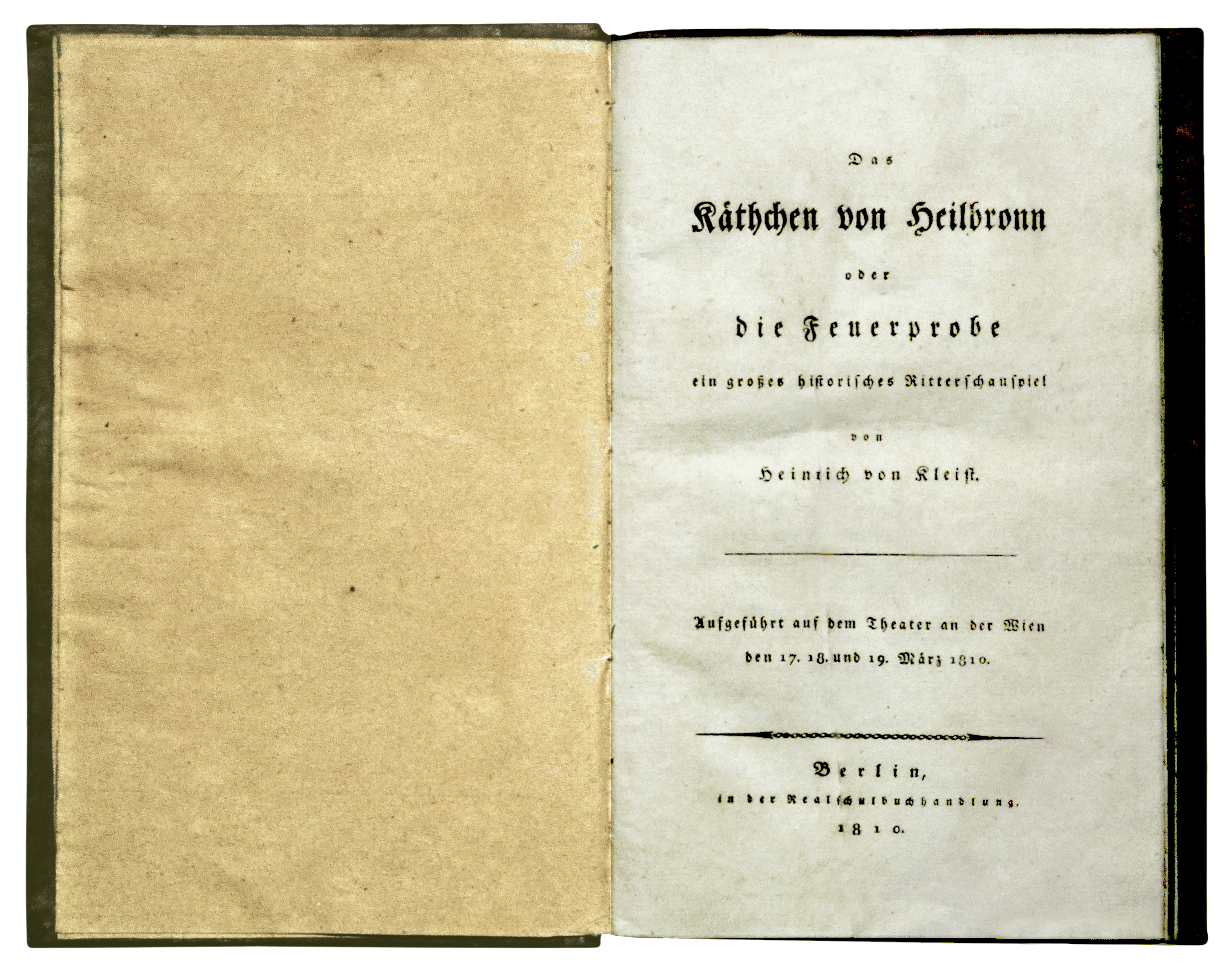 Heinrich von Kleist: Das Käthchen von Heilbronn. Titelblatt des Erstdrucks (1810)